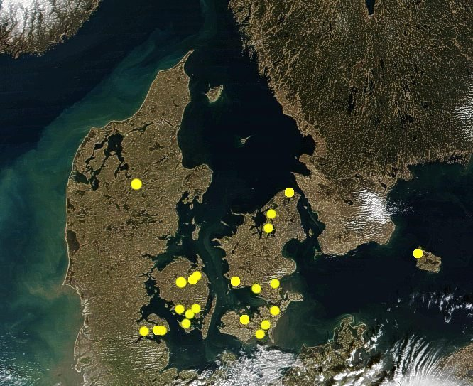 Satellitfoto med markeringer af fund af fugleinfluenza i Danmark